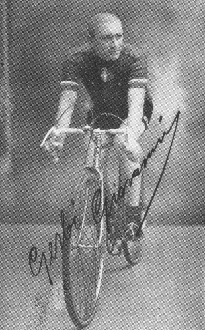 Fotografia autografata di Giovanni Gerbi